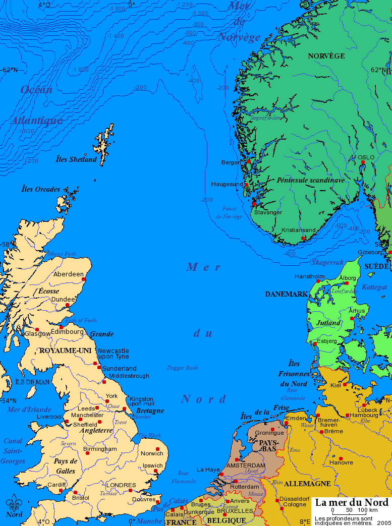 Carte de la mer du Nord, ses villes et ports principaux. Données de 2005. Projection de Mercator. Fond de carte provenant du fichier Image:Mer du Nord-vierge.png. 2005 Bra